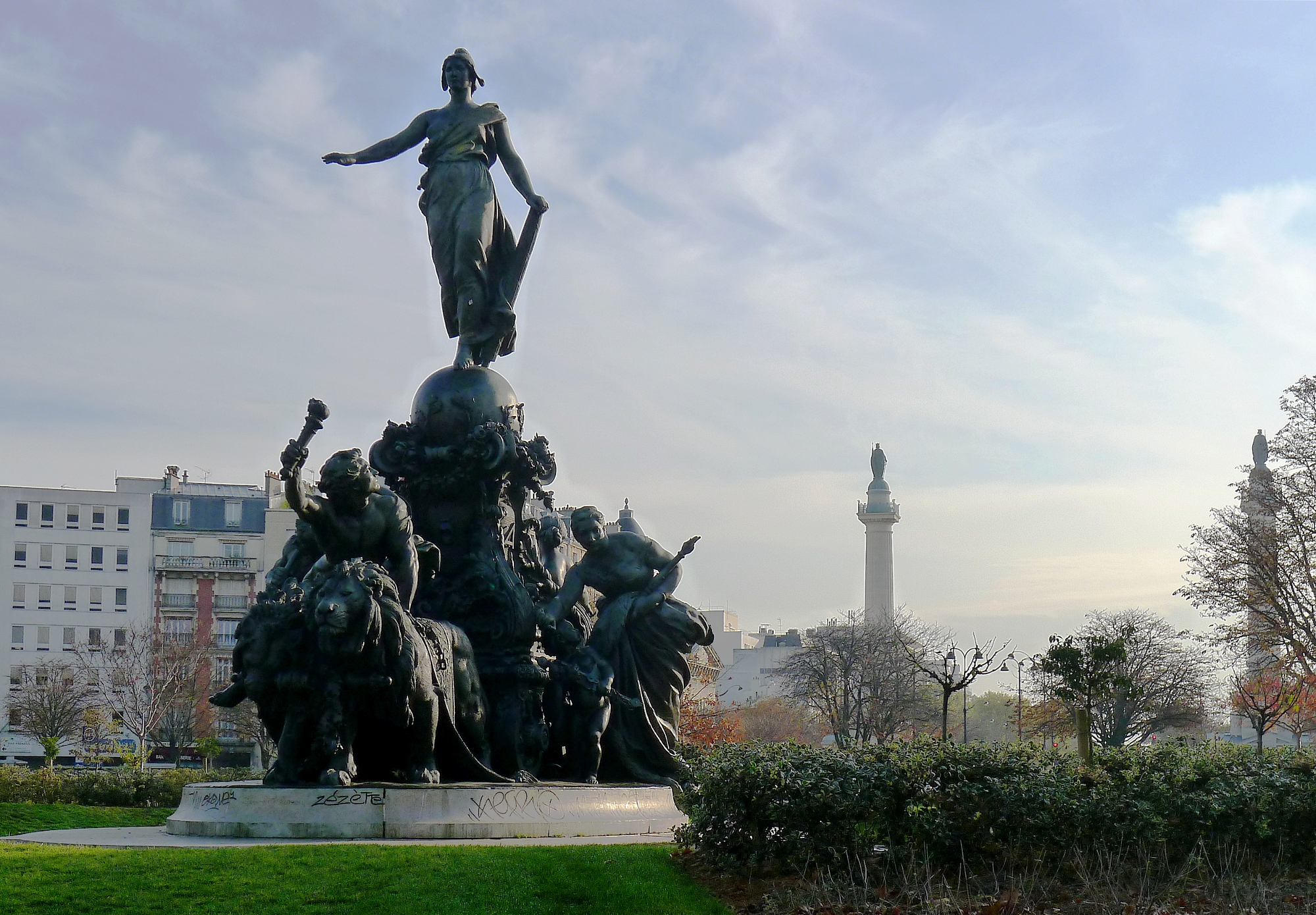 "Triomphe de la République" de Jules Dalou (place de la Nation) ; en arrière plan les colonnes de la Barrière du Trône - Paris XI, XII et XX